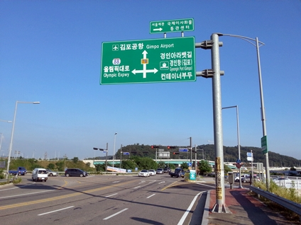 금포로와 아라육로의 교차로.금포로 방향(직진)으로 진행하면 개화동로와 연결된다. 경기도 김포시 고촌읍.